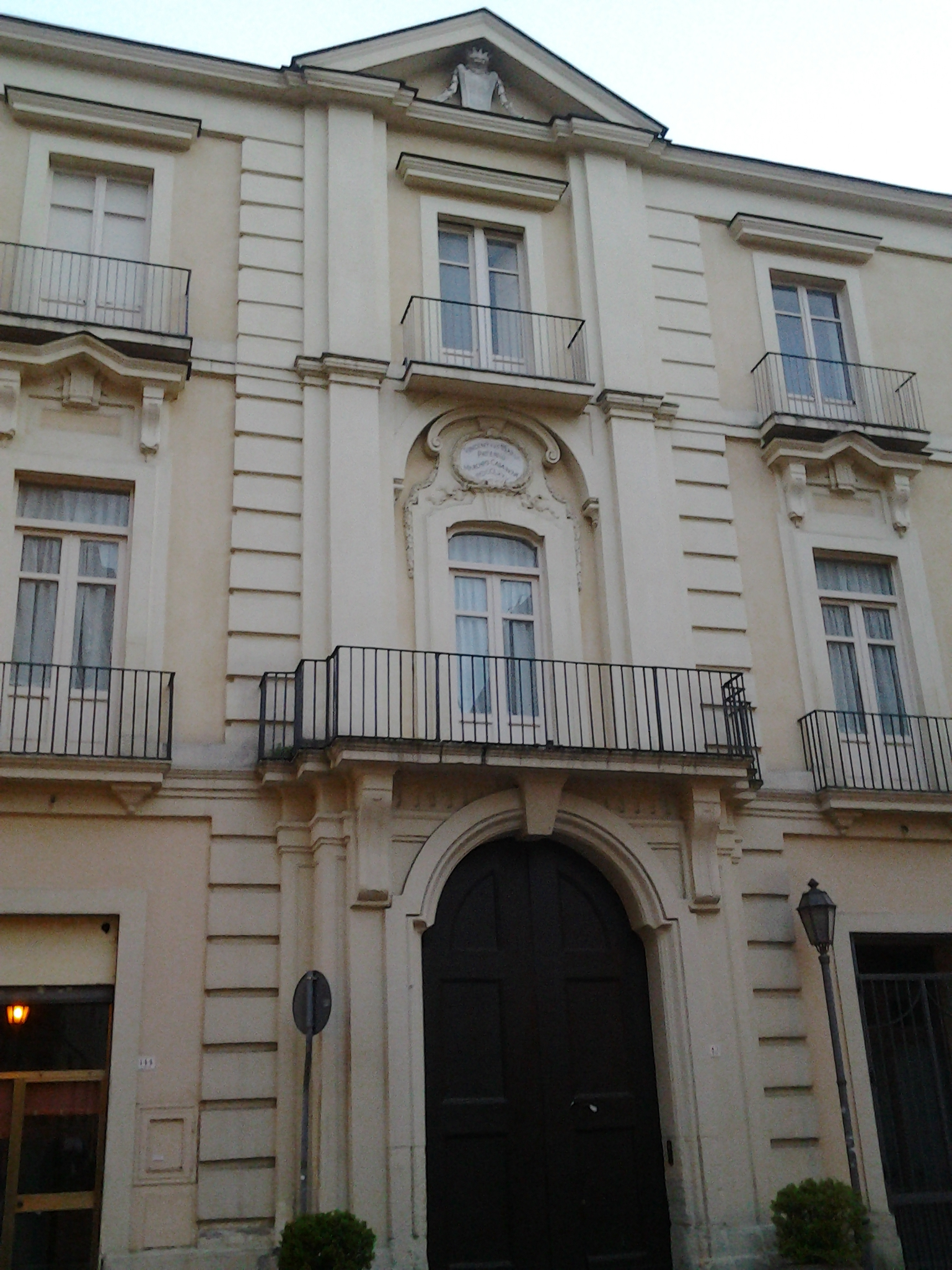 Caserta, palazzo Paternò, opera di Gaetano Barba, XVIII secolo.